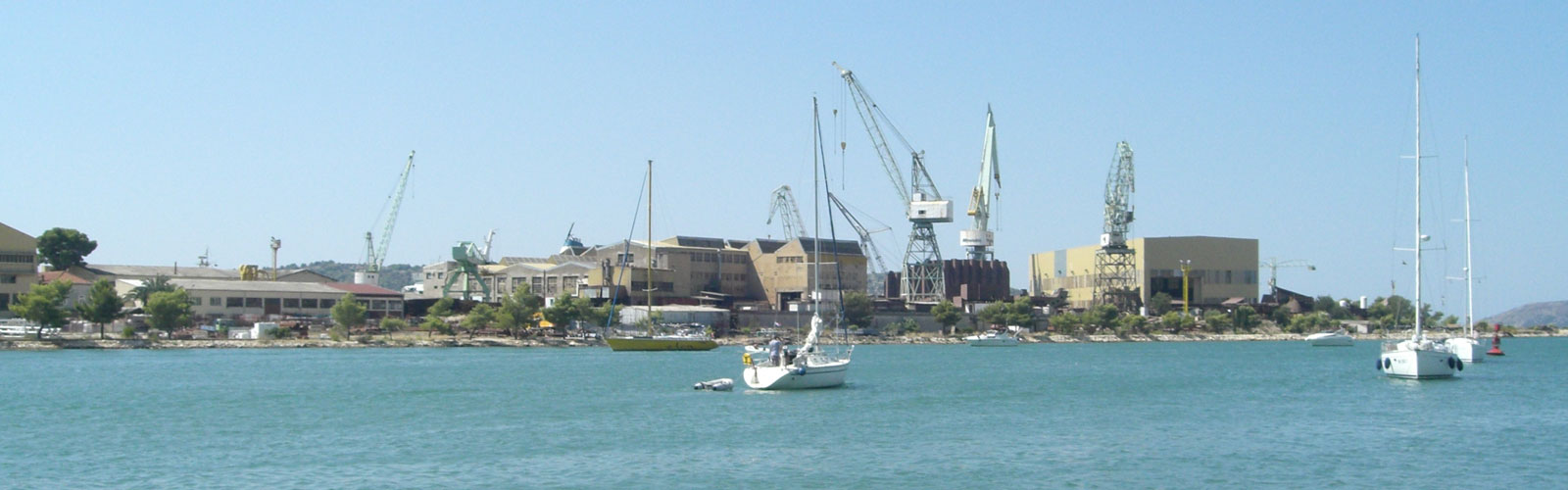 Trogir: detail